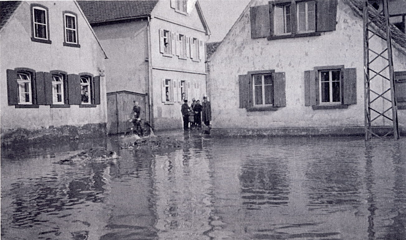 Stechgraben - Hochwasser in Rödersheim, Hollandstraße vor 1940